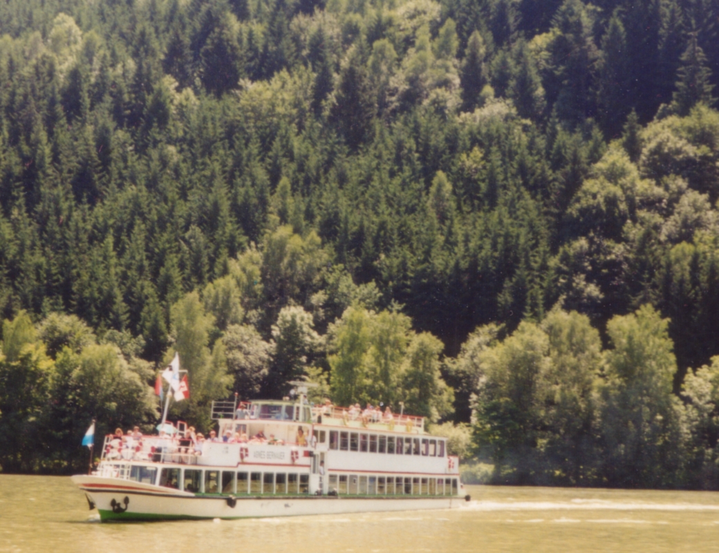 Wurm und Köck Donauausflugsschiff